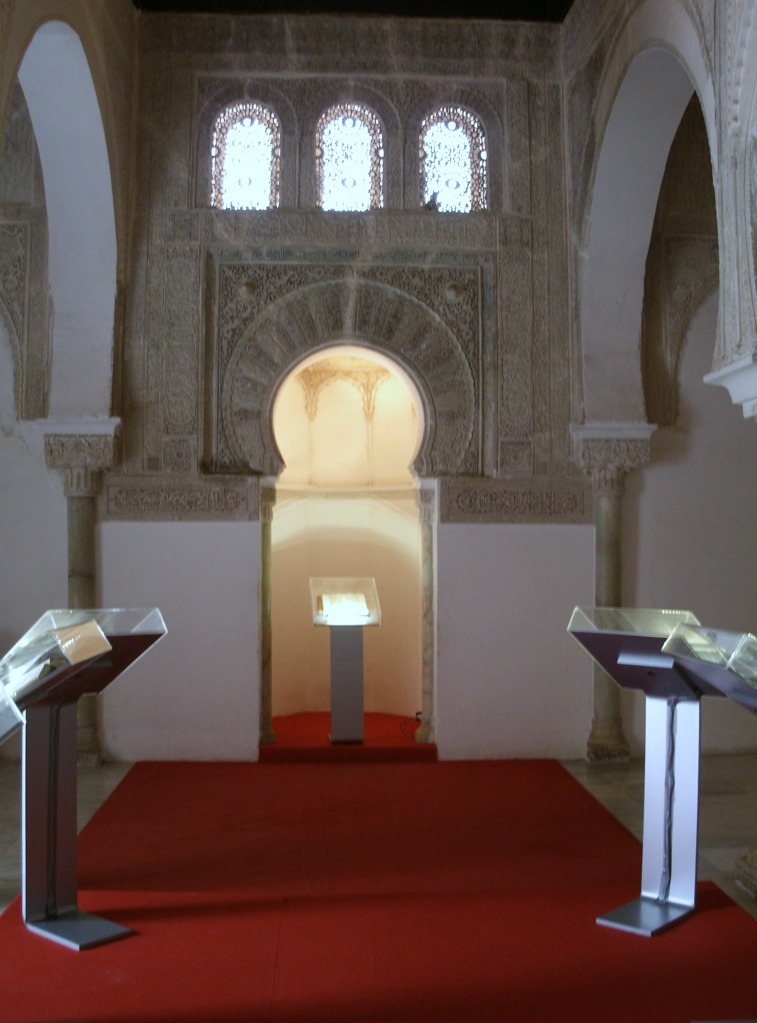 Mihrab de la mosquée de Sidi Bellahsen